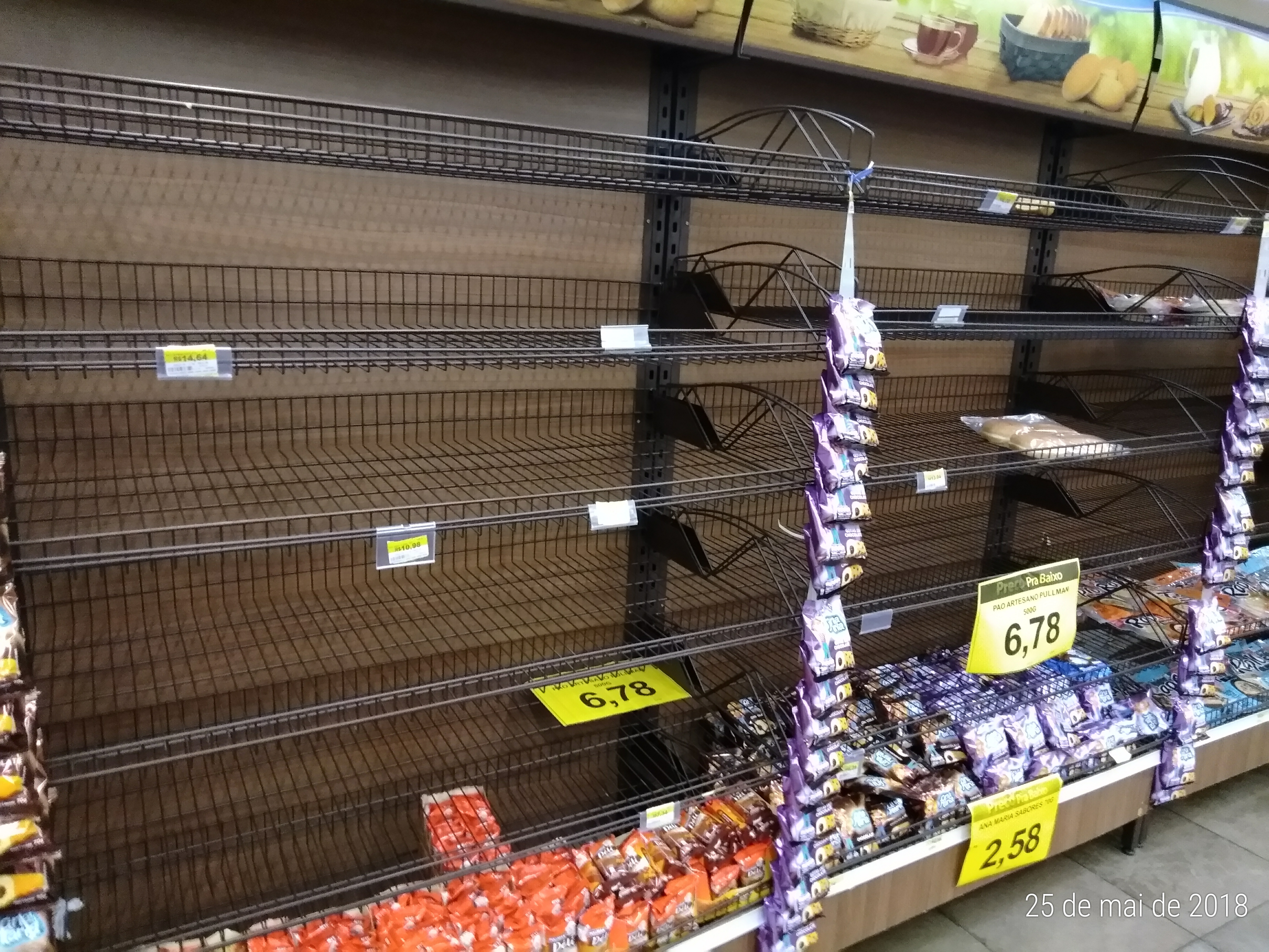 Escassez de pão em loja supermercado Nacional no bairro Bela Vista em Porto Alegre. Dia 15 de maio de 2018